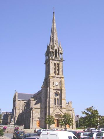 Église de Pléneuf-Val-André prise par Hervé Tigier en 2005.